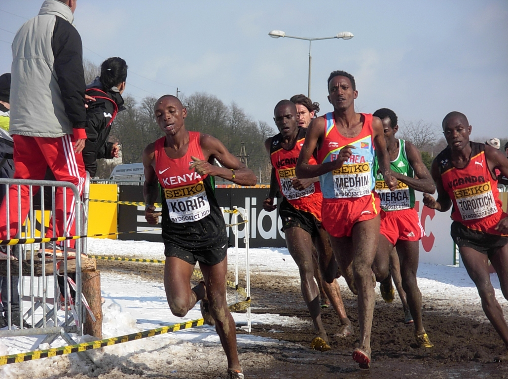 Mistrzostwa Świata w Biegach Przełajowych IAFF 2013 w Leśnym Parku Kultury i Wypoczynku Myślęcinek w Bydgoszczy